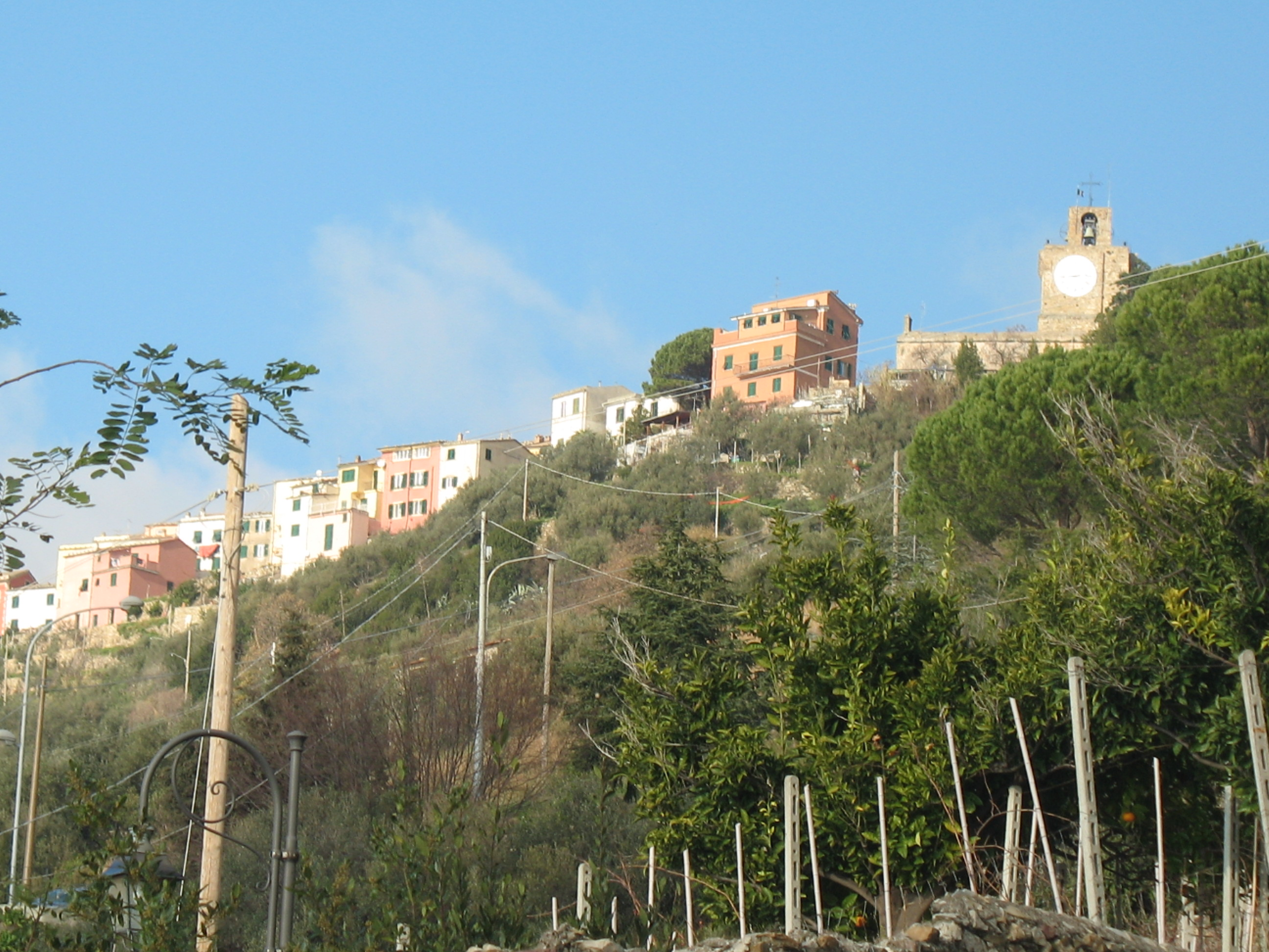 Immagine dalla Riviera ligure